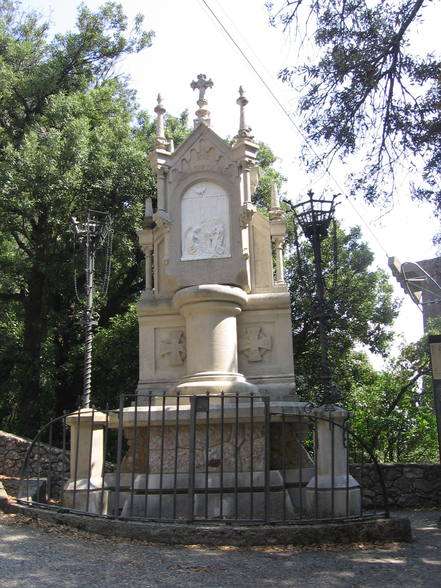 Rosario Monumental de Montserrat: Primer Misterio de Gozo. La Anunciación. Obra de los escultores Pujol y García, con un relieve de mármol de Francesc Pagès i Serratosa.